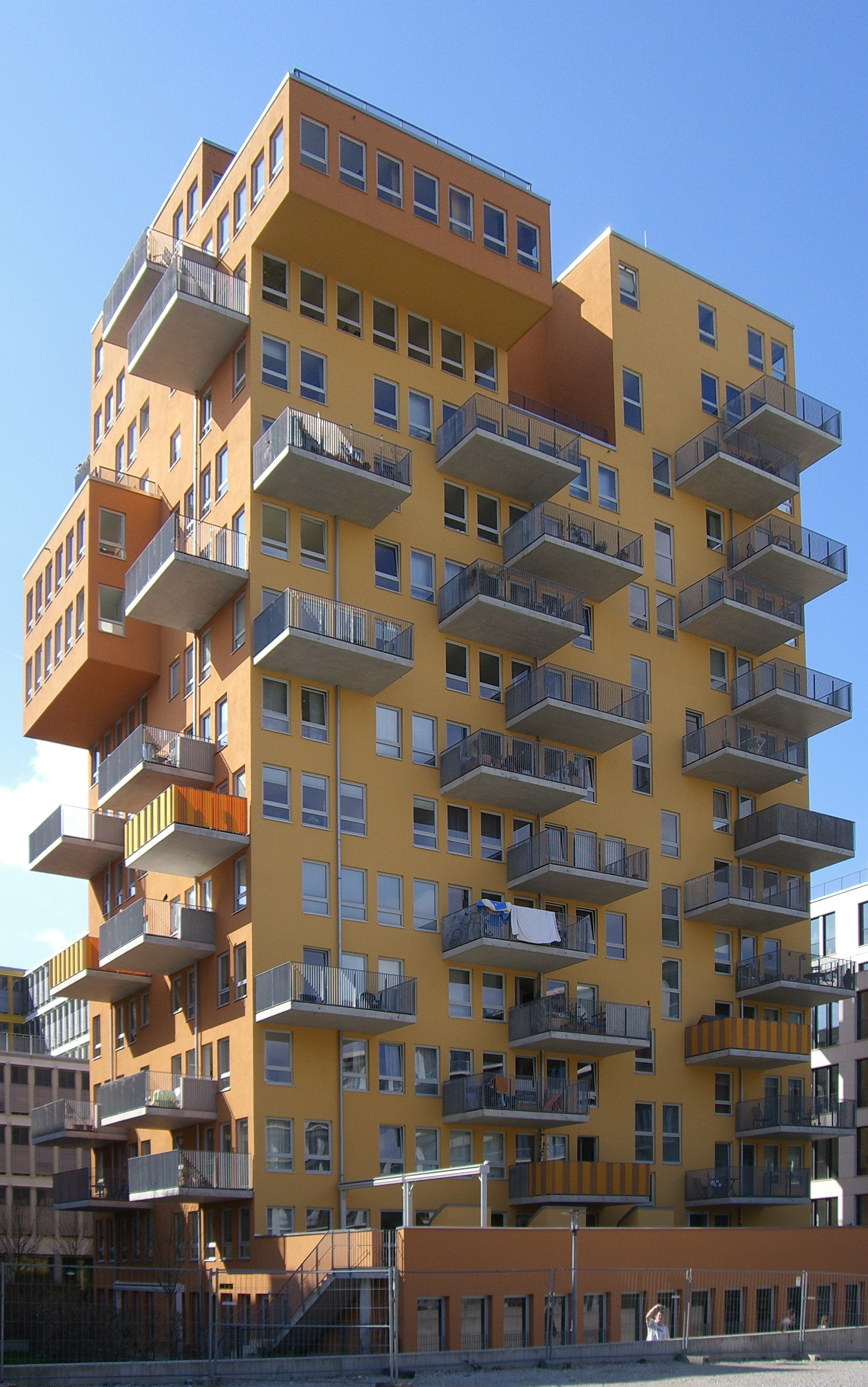 Gebäude von Otto Steidle auf der Münchner Theresienhöhe